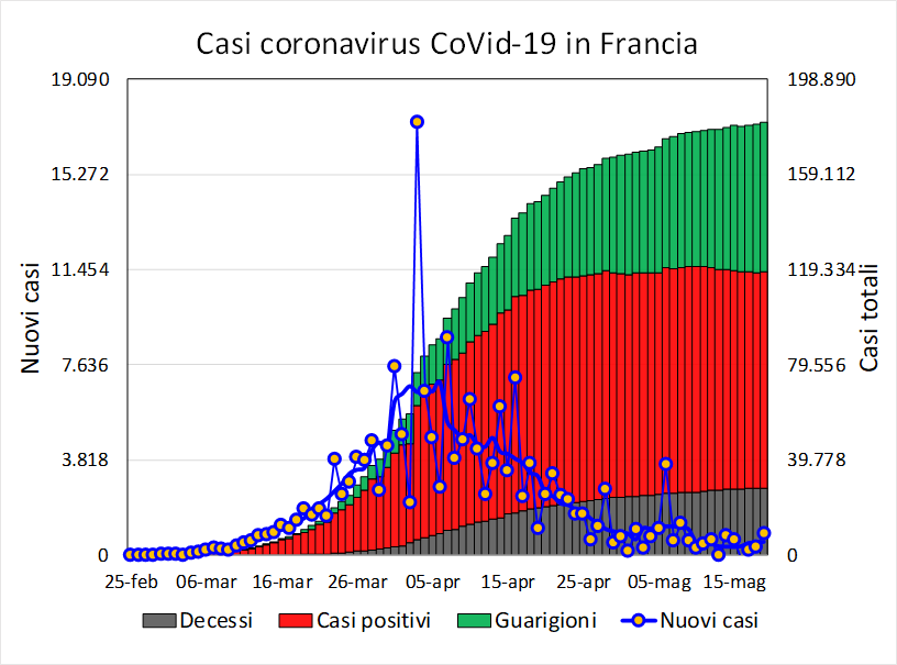 Andamento giornaliero dei casi relativi alla pandemia di COVID-19. Sono evidenziati decessi, guarigioni, casi attivi e nuovi casi giornalieri.